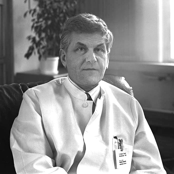 Andrzej Szczeklik (ur. 29 lipca 1938, zm. 3 lutego 2012) – polski lekarz-naukowiec, profesor Kliniki Chorób Wewnętrznych Uniwersytetu Jagiellońskiego, pisarz eseista i filozof medycyny, wiceprezes Polskiej Akademii Umiejętności, animator Akademii Młodych "PAUeczka Akademicka". Zajmował się pracą naukową z zakresu kardiologii i pulmonologii.